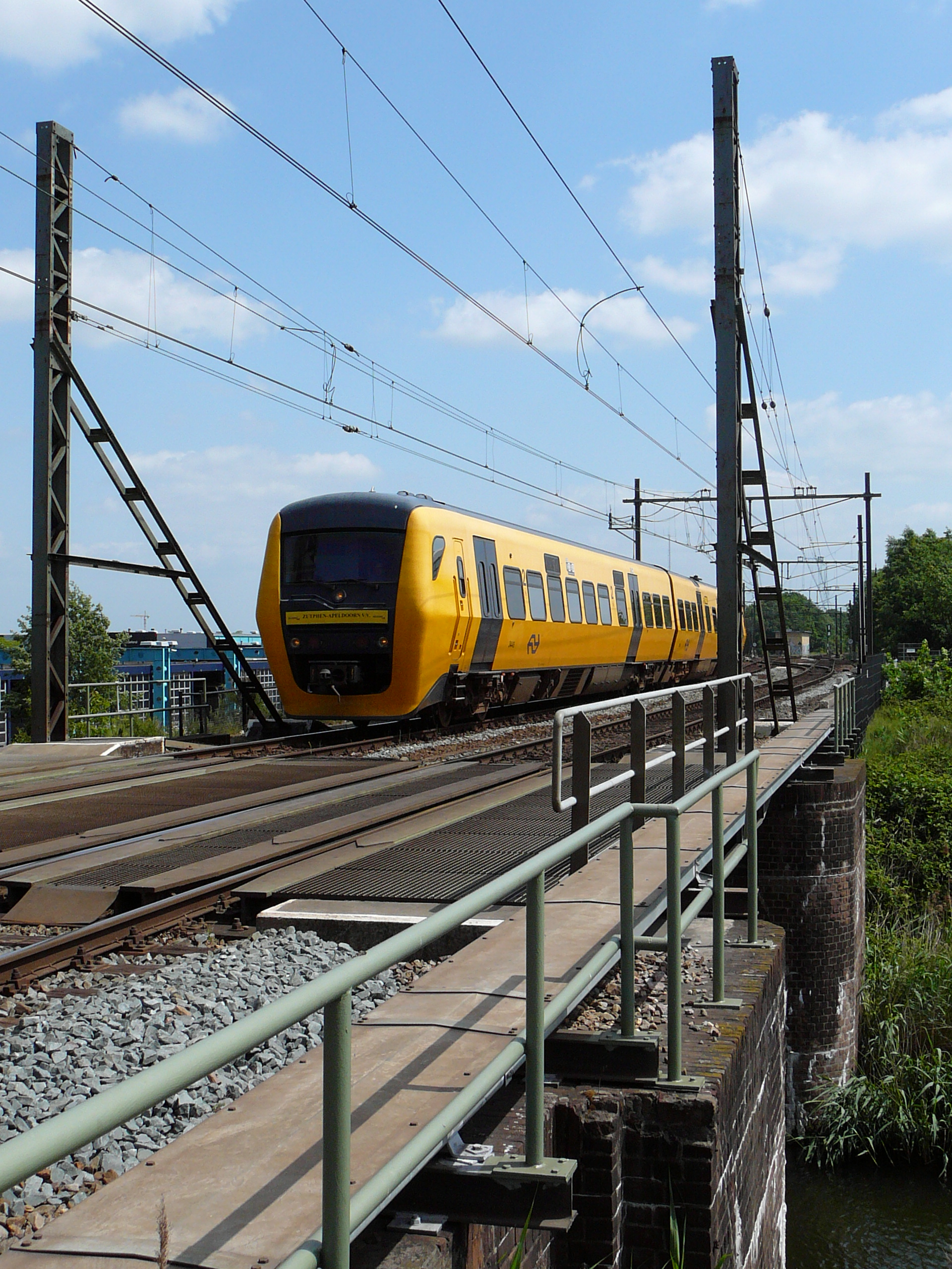 DM'90 treinstel 3445 Zutphen-Apeldoorn in Apeldoorn